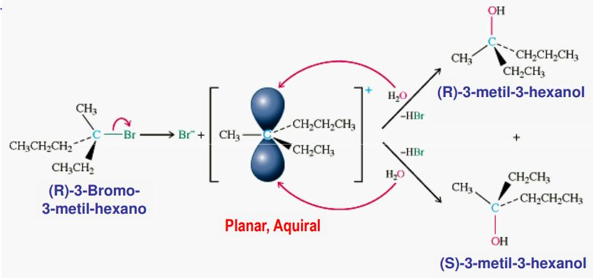 estereoquimica reação sn1